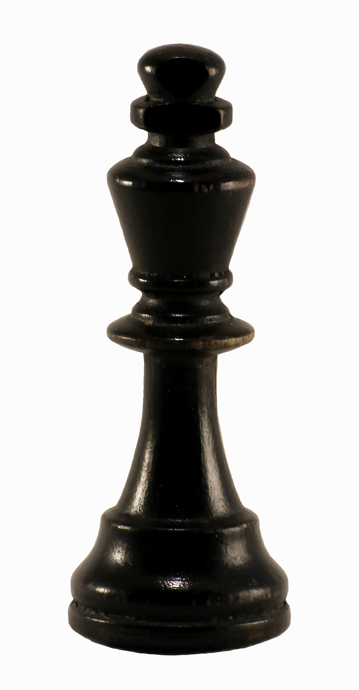 Svart kung från schackspel.